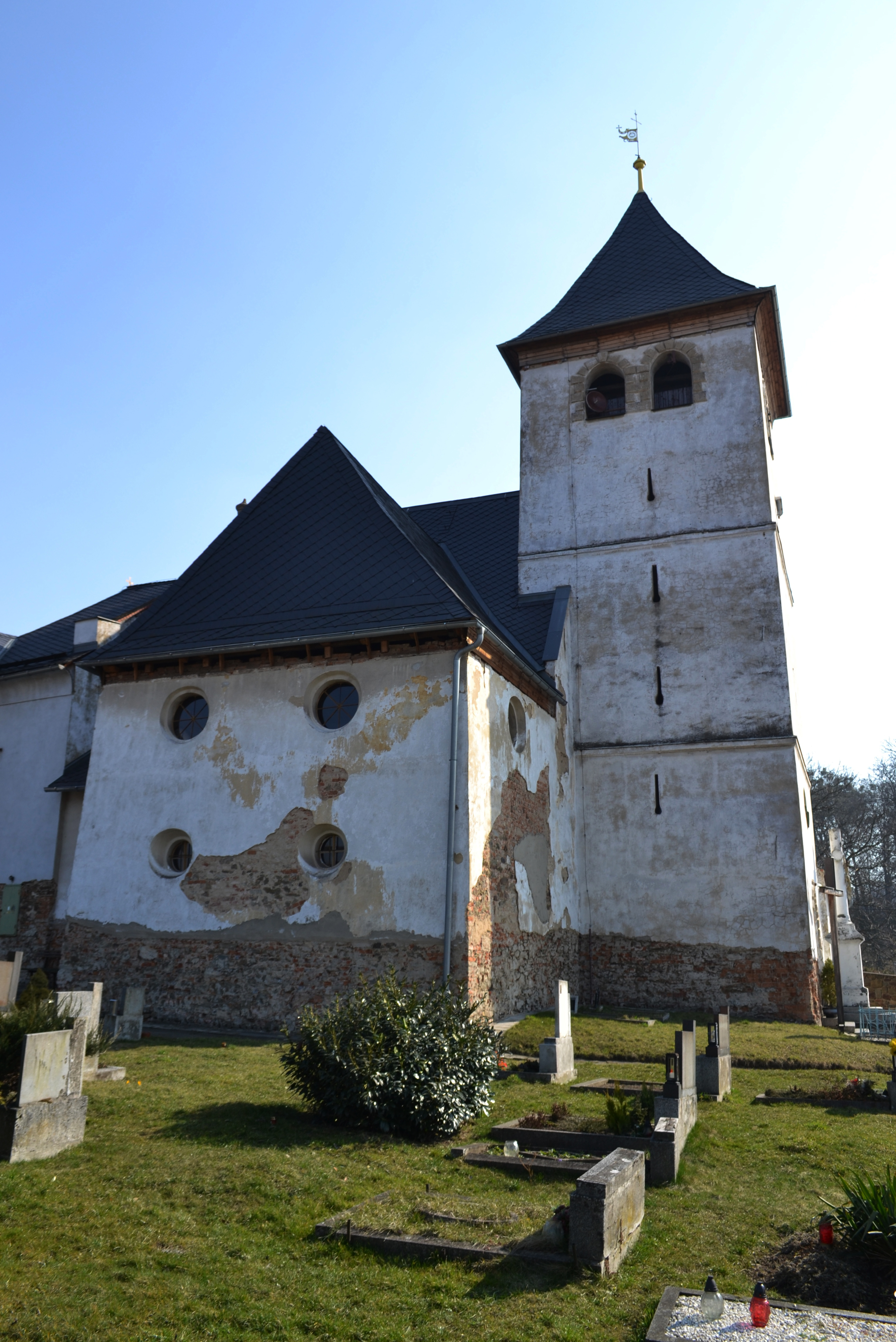 Severní pohled na kostel Nejsvětější Trojice (Raduň, Moravskoslezský kraj, Česká republika)